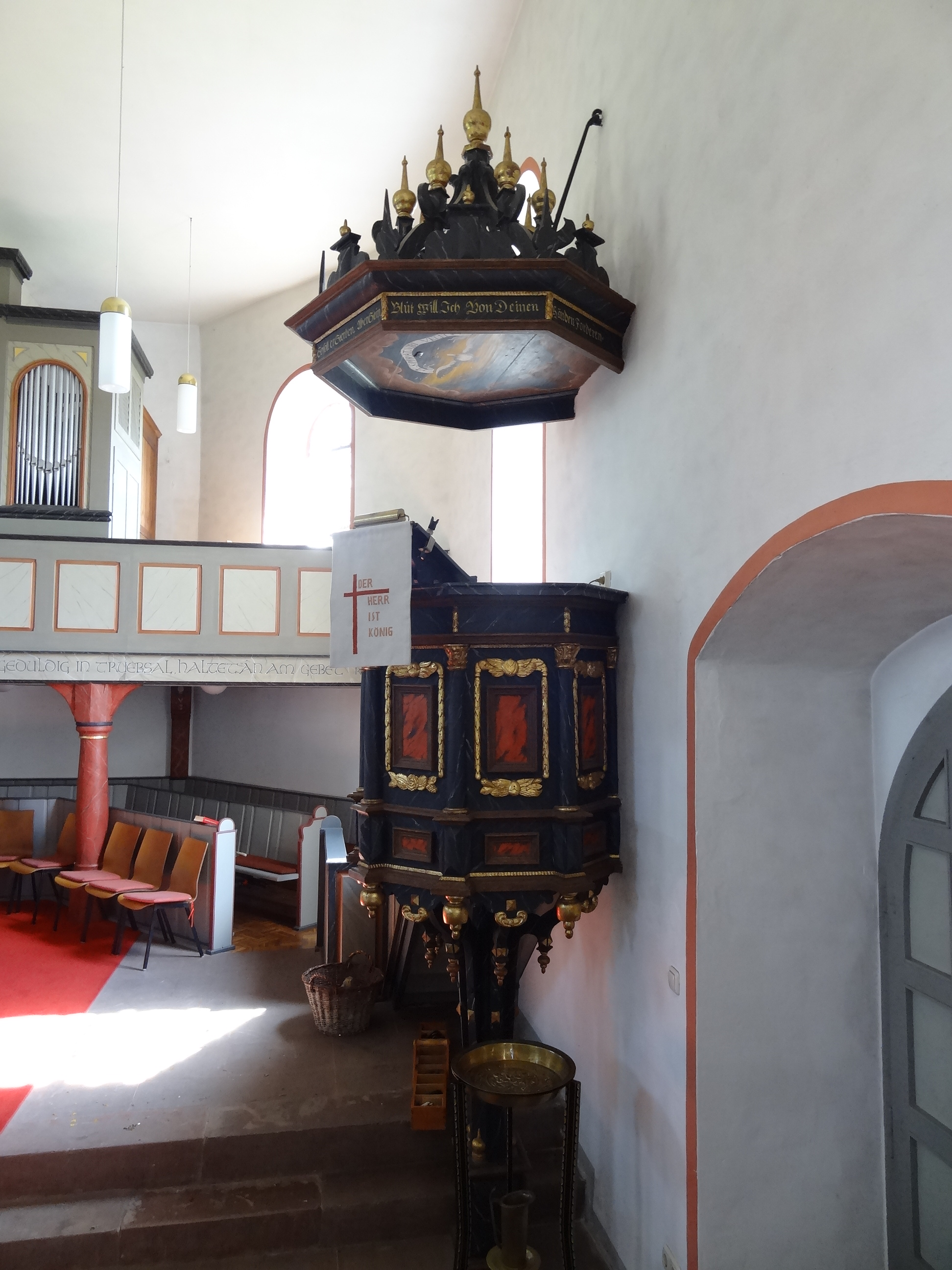 Evangelische Kirche Eberstadt